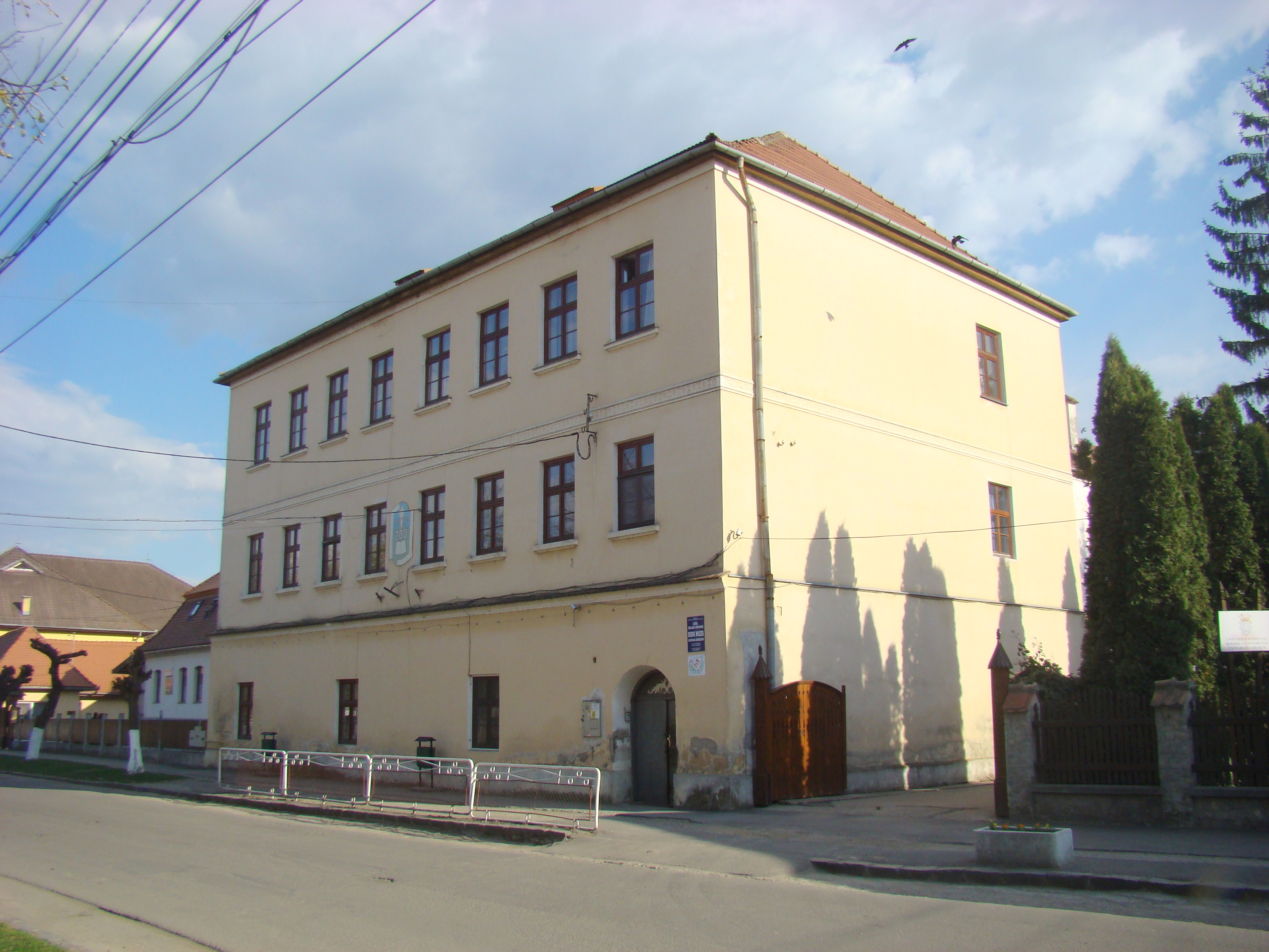 Gimnaziul Superior Unitarian, azi școală generală, oraș Cristuru Secuiesc, str. Orbán Balázs 16 1876